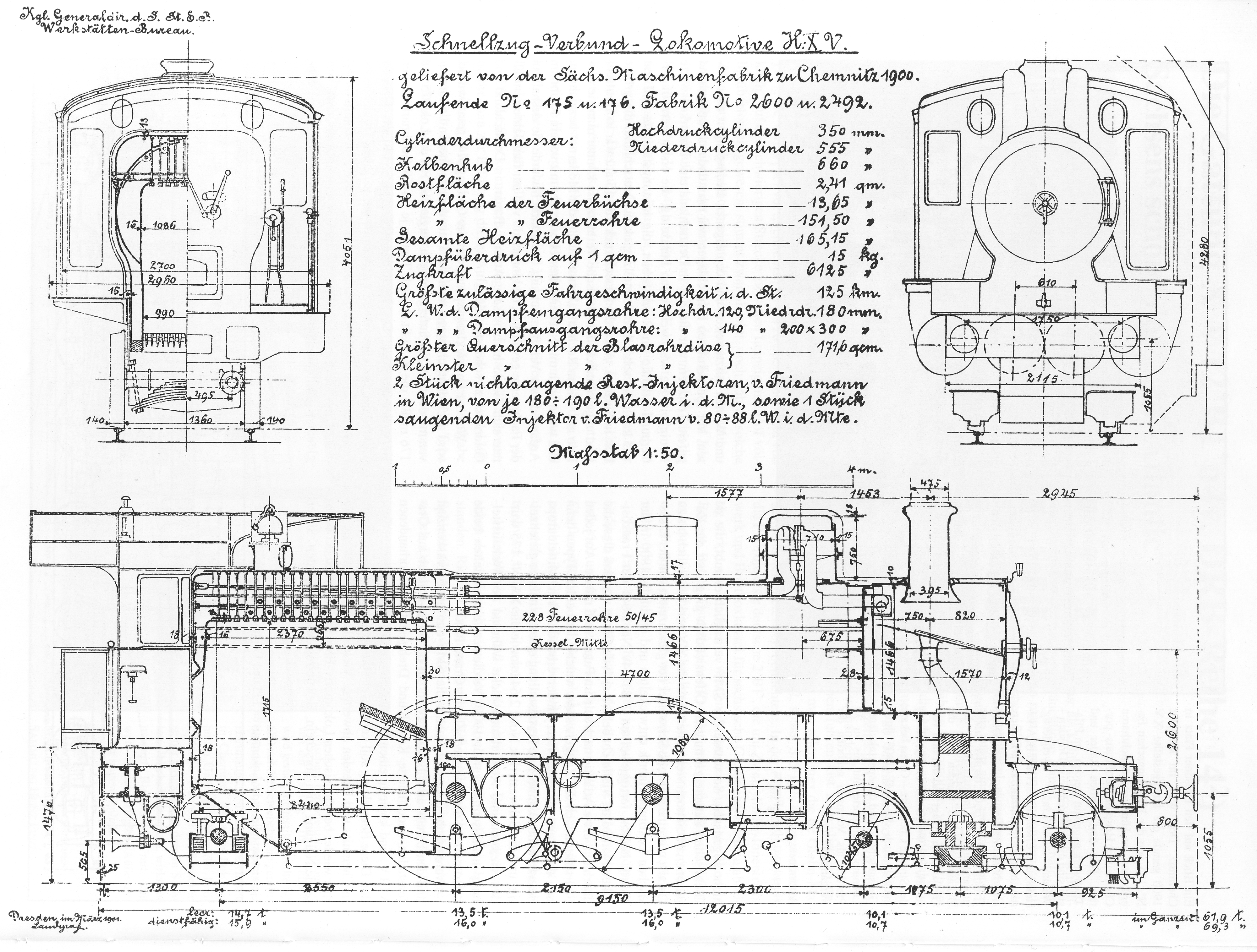 Musterblatt der Dampflokomotiven Sächsische X V des Werkstättenbüros der Königlich Generaldirektion für die Lokomotiven Nr. 175 und 176 der ersten Bauserie.